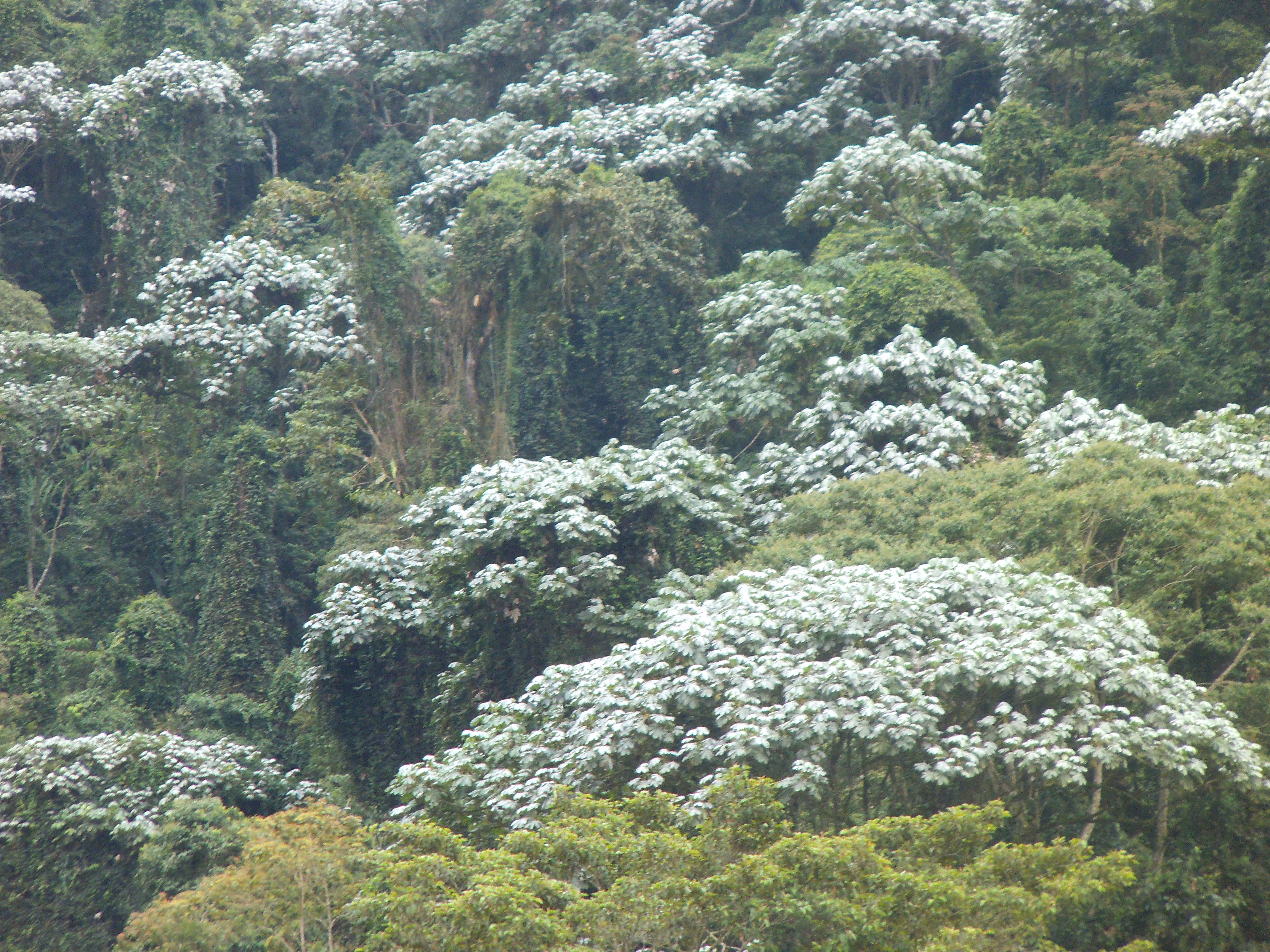 Lugar conocido como Alaska, zona rural de Buga Esta fotografía fue tomada en el municipio colombiano con código 76111.